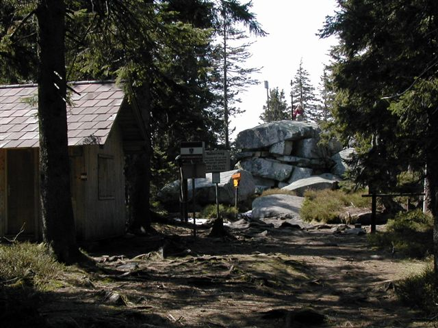 Staatsgrenze am Plöckenstein